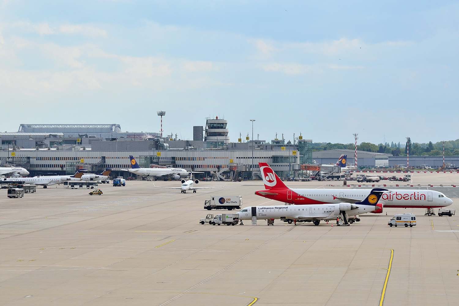 Flughafen Düsseldorf (DUS), Datum/Uhrzeit: 13.05.2013 17:42:00